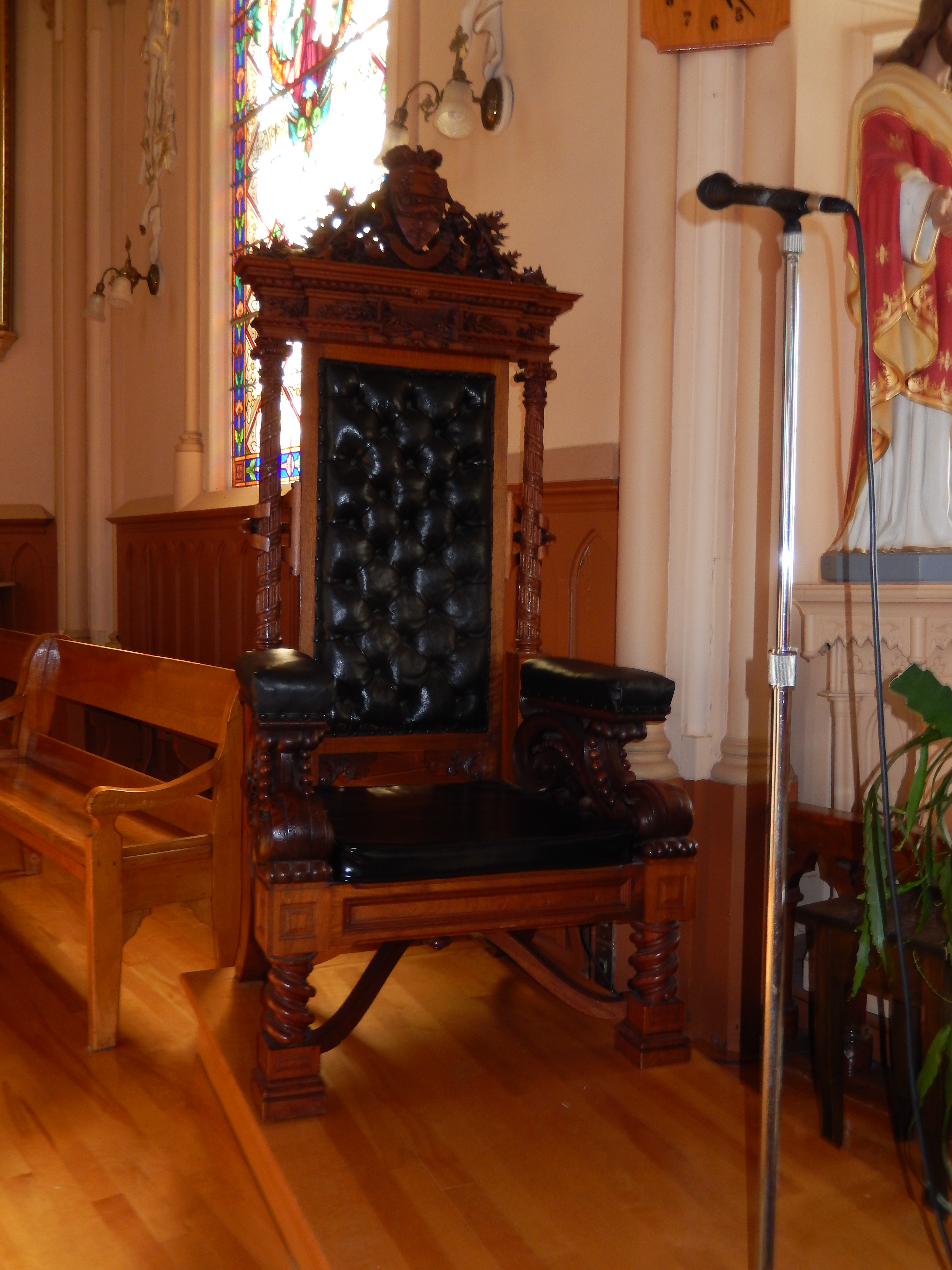 Chaise de Joseph-Napoléon Francoeur en tant que président de l'assemblée législative du Québec située à l'intérieur de l'église Sainte-Emmélie à Leclerville